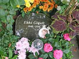 Die Grabstätte des Schlagersängers Ekki Göpelt.